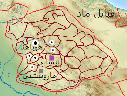 نقشۀ 5 استان شورشی الیپی در سال 714 پیش از میلاد